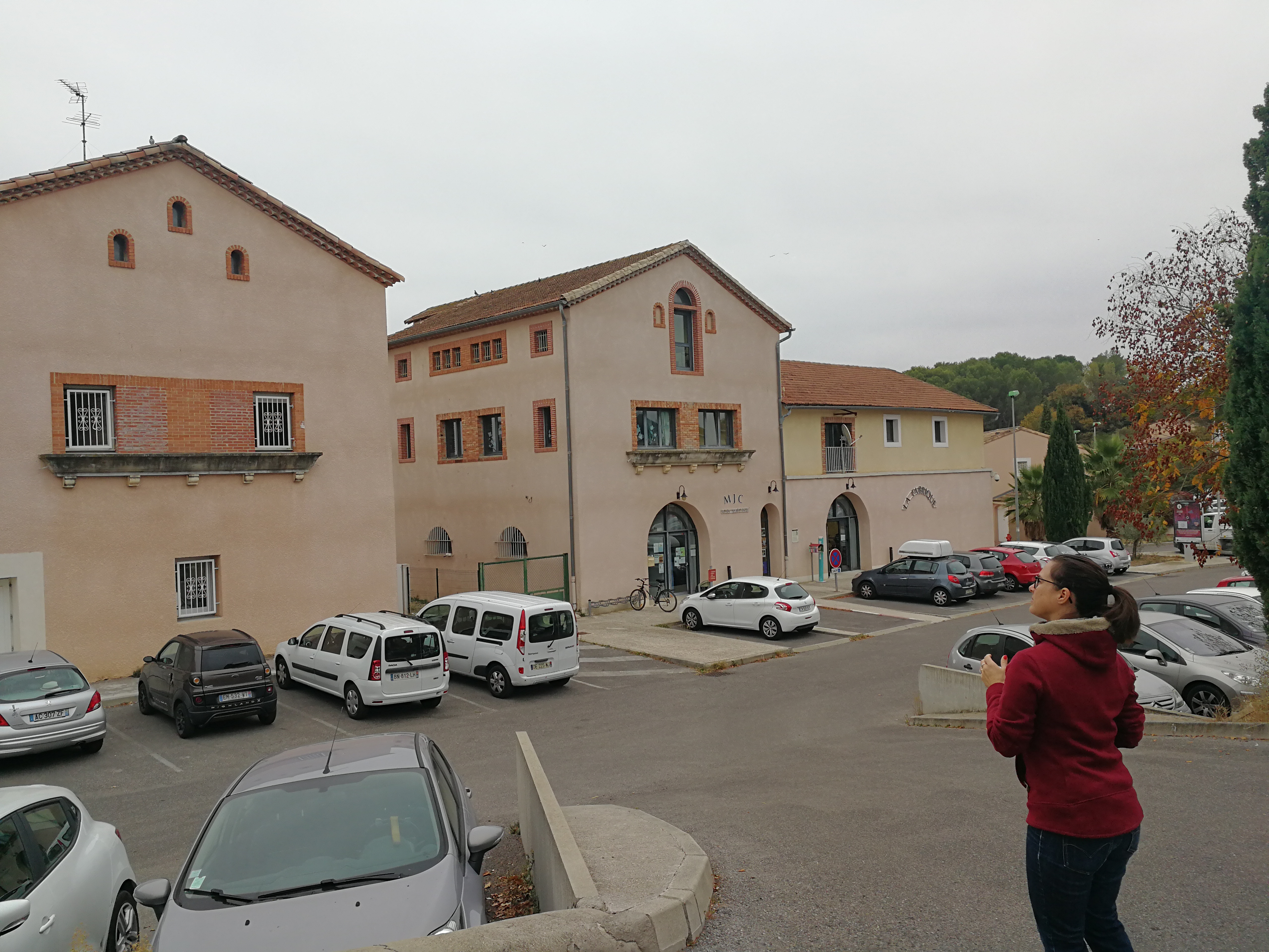 Photo prise pendant l'OPL Jacou 2017